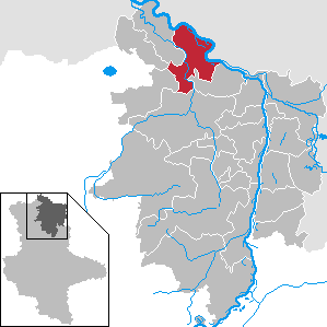 Seehausen (Altmark) im Landkreis Stendal, Sachsen-Anhalt